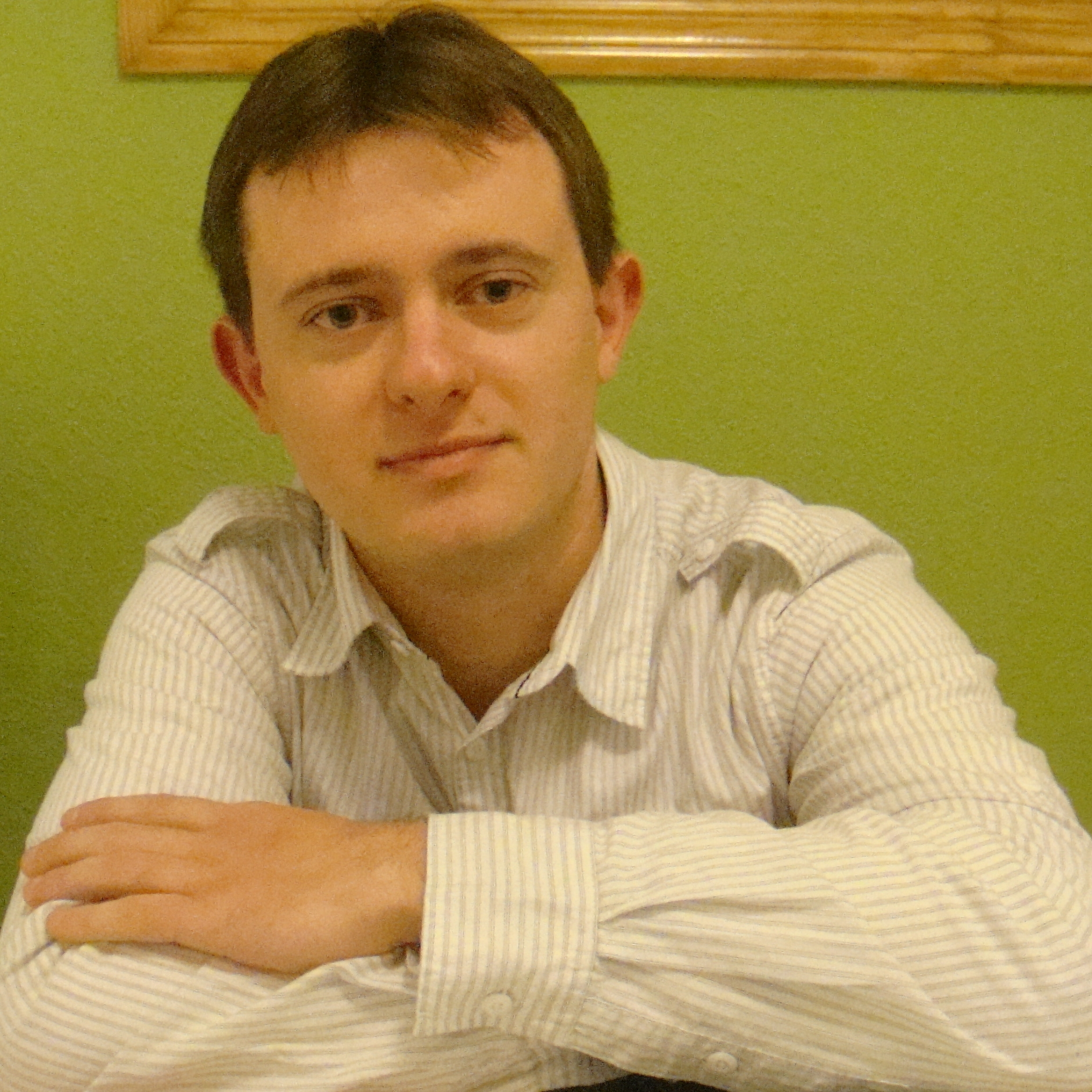 Javier Pellicer, escritor español. Autor de la novela histórica "El espíritu del lince".